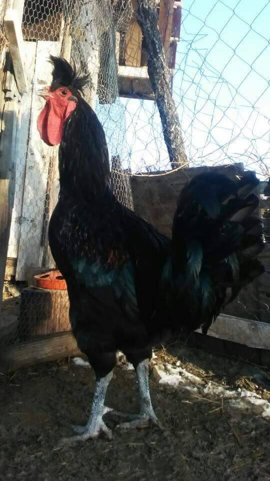 Sandschak Kräher Hahn